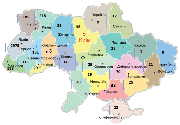 Географія вступників (бакалаврів на основі ПЗСО) у 2019 р. за областями України